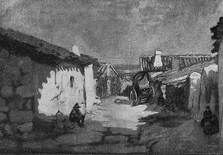 Calleja de Miraflores.